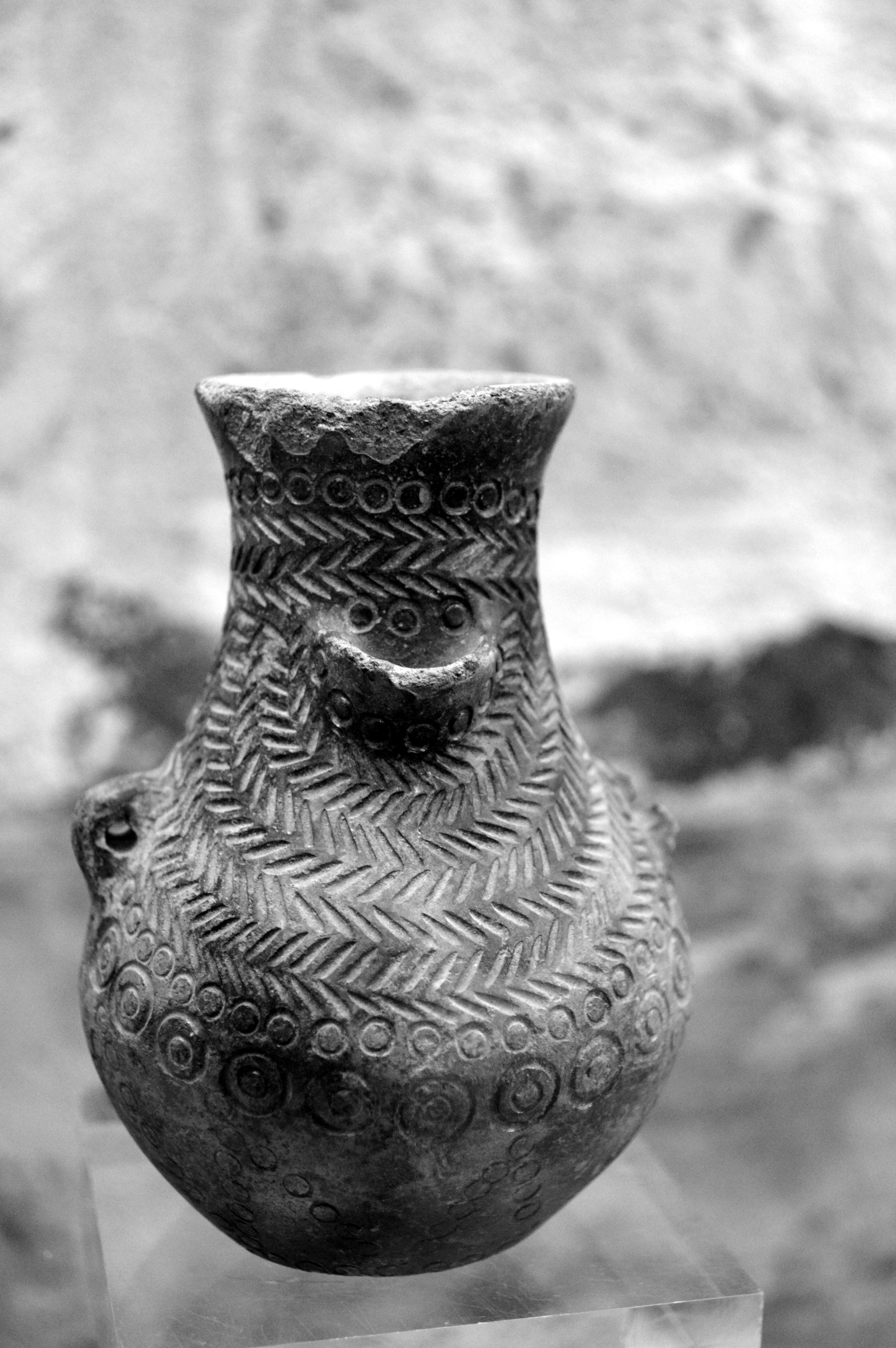 Museo archeologico "Villa Abbas" - MIBAC This is a photo of a monument which is part of cultural heritage of Italy.